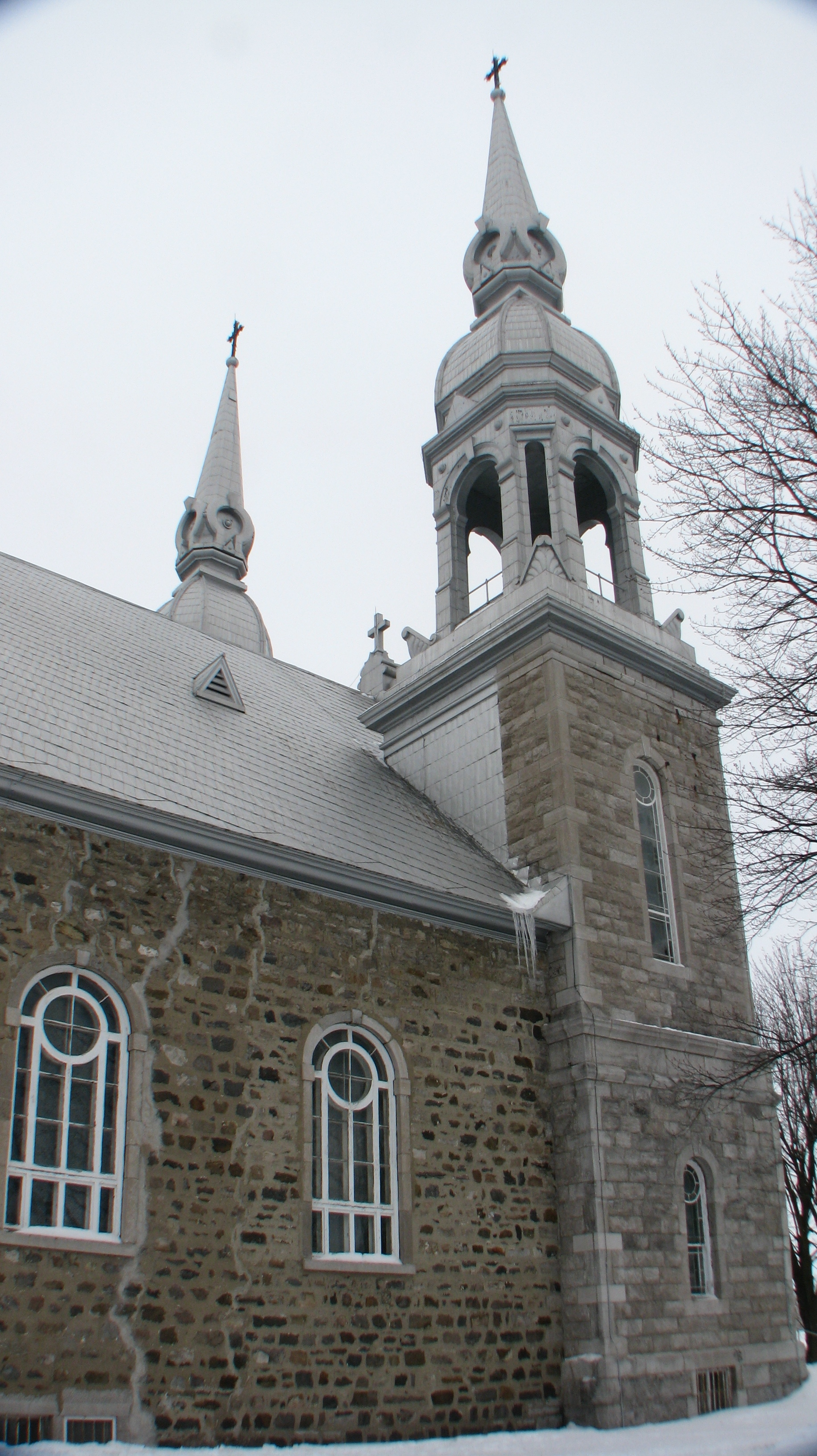 Église de Massueville en Montérégie au Québec